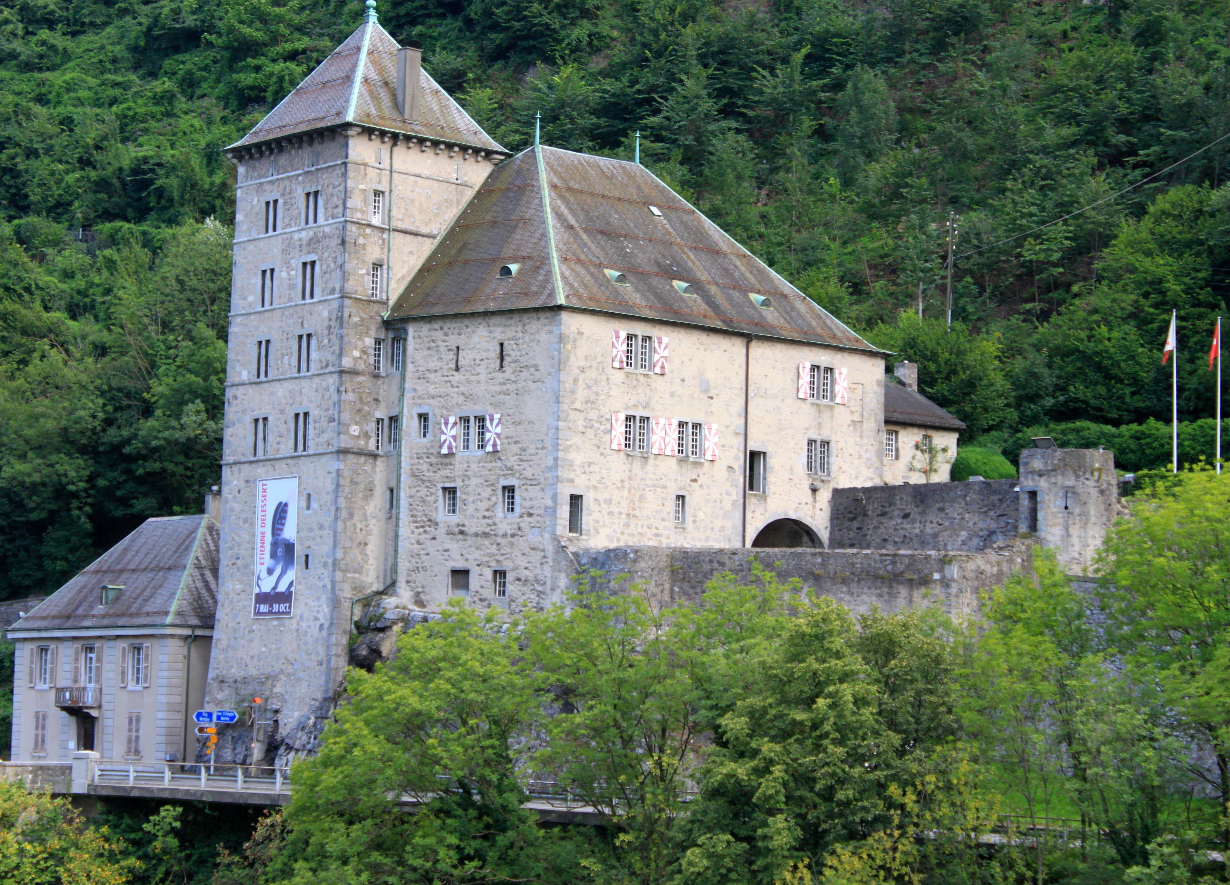 Suisse, canton du Valais, Saint-Maurice, Château.